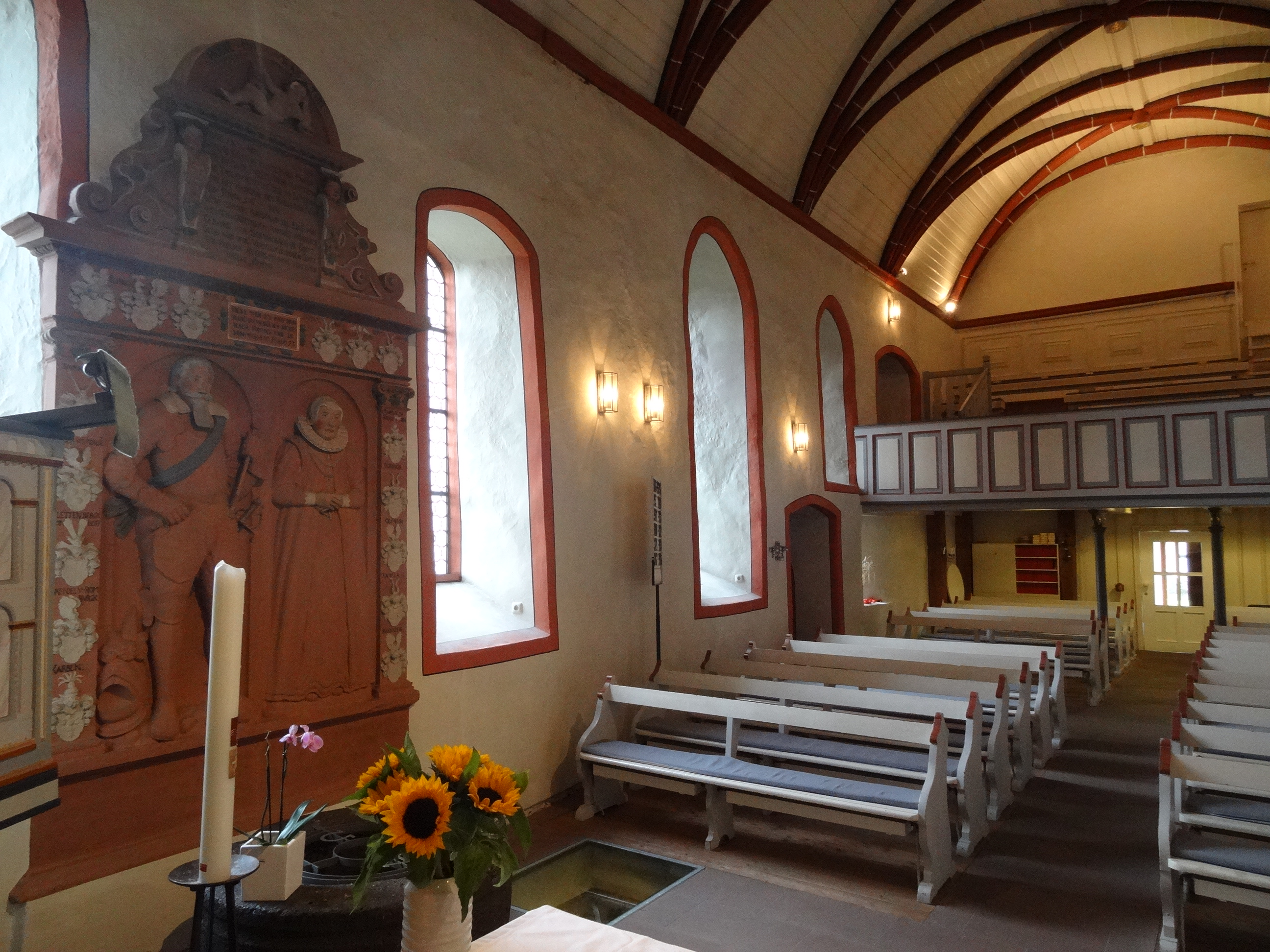 Evangelische Kirche Alten-Buseck